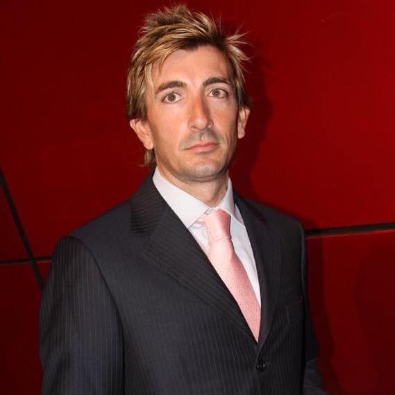 Medalla Real Orden del Merito Deportivo